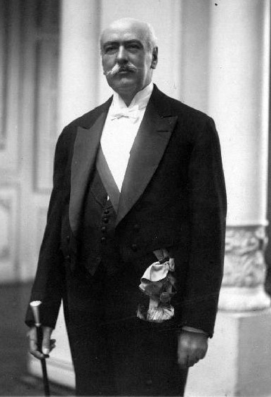 Juan Luis Sanfuentes, Presidente de Chile (1915-1920)